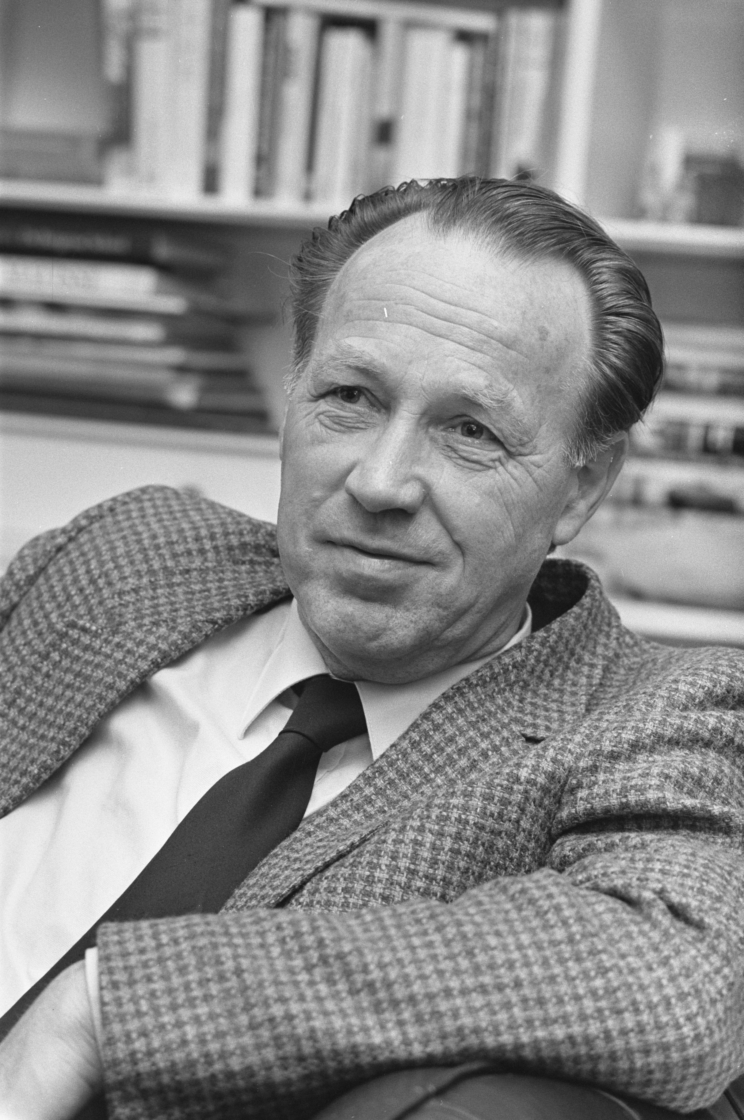 Collectie / Archief : Fotocollectie Anefo Reportage / Serie : [ onbekend ] Beschrijving : Ger Verrips Datum : 18 maart 1986 Trefwoorden : portretten Persoonsnaam : Verrips, Ger Fotograaf : Bogaerts, Rob / Anefo Auteursrechthebbende : Nationaal Archief Materiaalsoort : Negatief (zwart/wit) Nummer archiefinventaris : bekijk toegang 2.24.01.05 Bestanddeelnummer : 933-6003